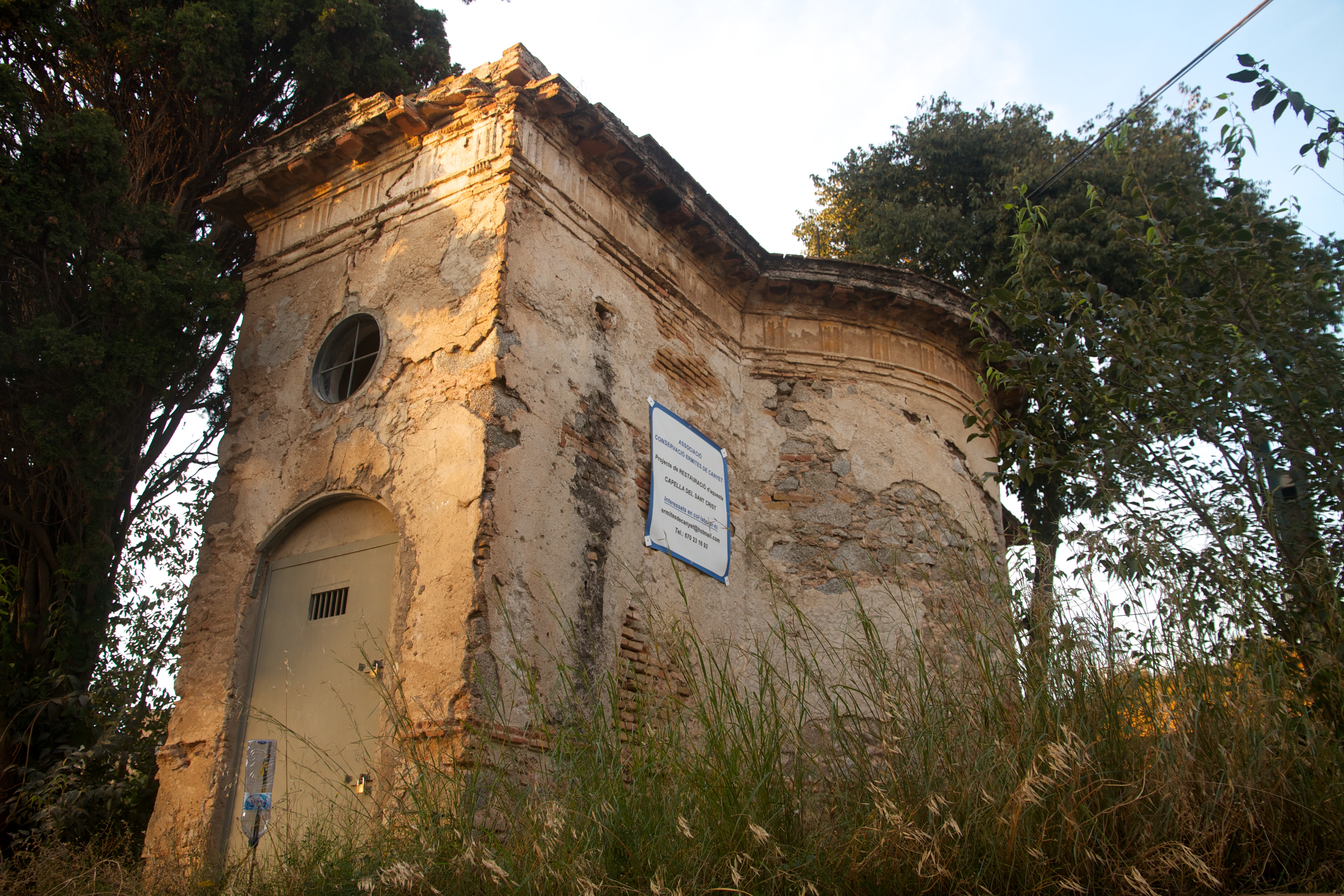 Esta capilla no se corresponde exactamente con los datos de GPS proporcionados en pero buscando un poco sale una imagen de una ermita con el nombre de Can Ferrater tomada hace tiempo en blanco y negro. He de decir que preguntando a la gente del lugar, nadie sabía de su existencia, algunos me llegaron a decir que había una llamada así y la derrumbaron...Tiene un cartel de la asociación de conservación de ermitas del Canyet y pone que su nombre es capilla del Santo Cristo, por lo que no estoy seguro de que esta sea la Capilla de Can Ferrater aunque si que pertenecía a la masía de Can Ferrater. Indico la verdadera posición GPS. Según un artículo del Punt es la única capilla del barroco en Badalona.